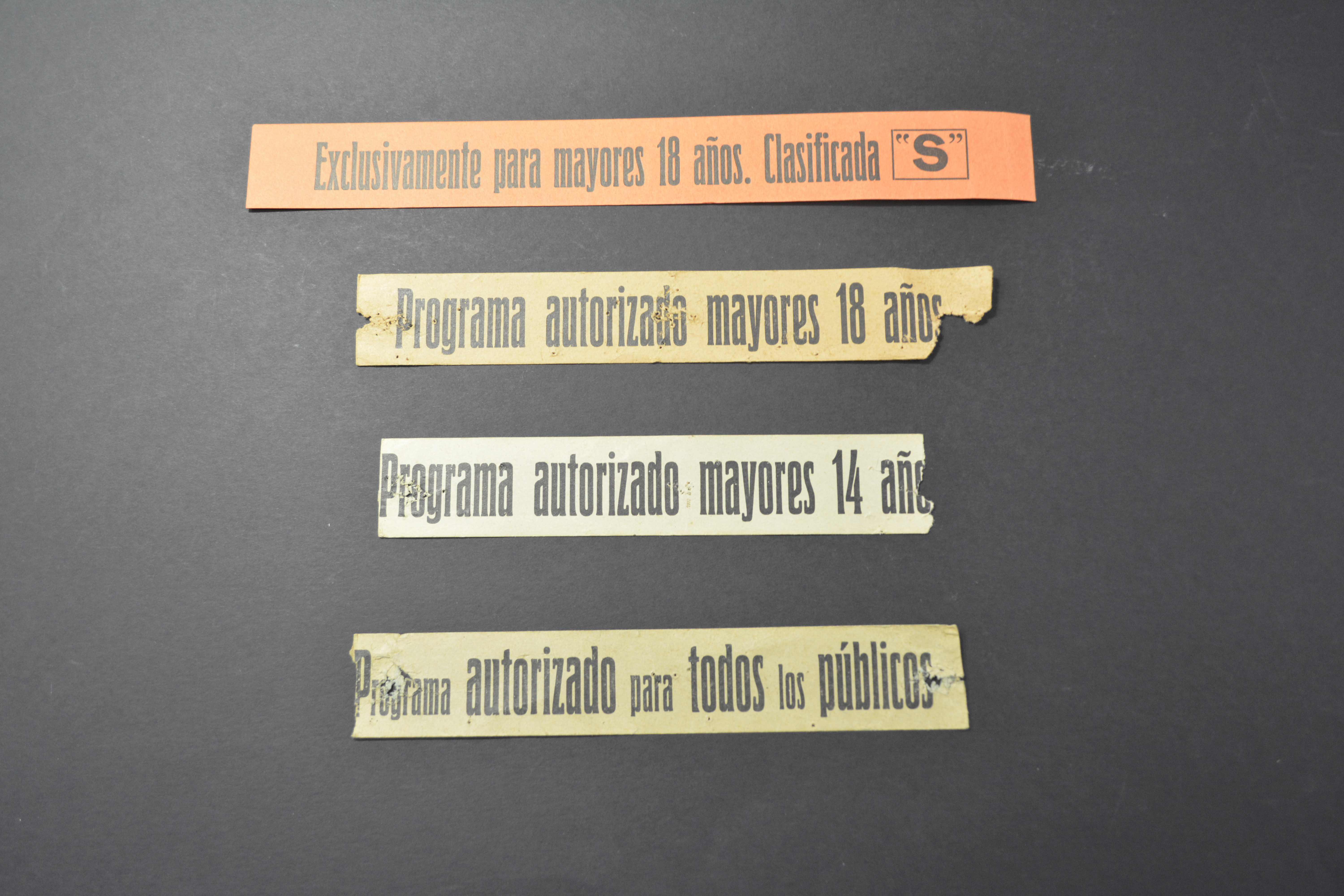 Imatge dels límits d'edat de les pel·lícules a les sales de Palafrugell (fons Círculo Mercantil - Arxiu Municipal de Palafrugell)